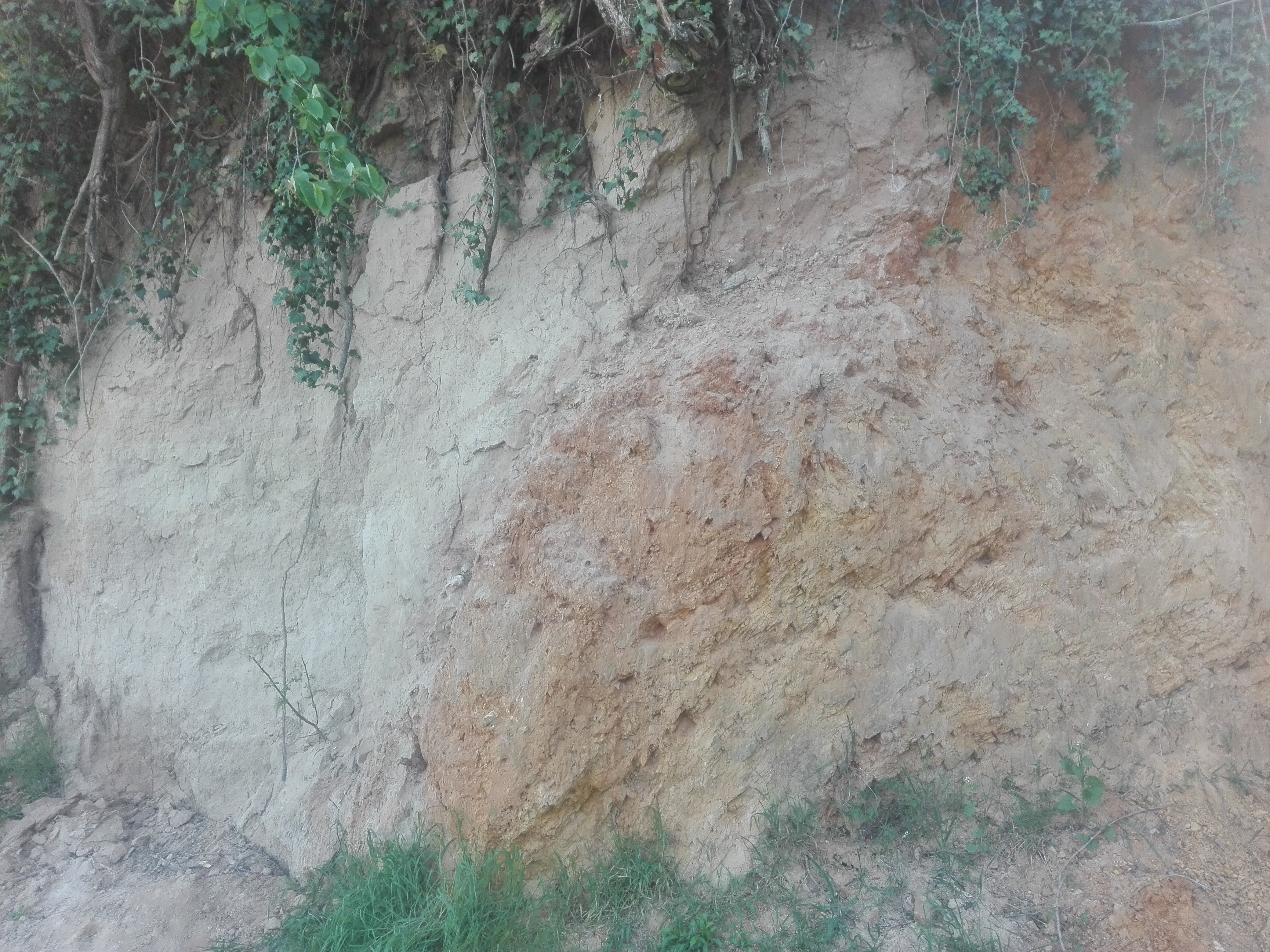 Lößwand norwestlich von Deidesheim am Rande des Pfälzerwaldes. Auf der rechten Seite ockerfarbener, verfalteter Sandstein, links Löß. In der Mitte Rheingrabenrand-Verwerfung.